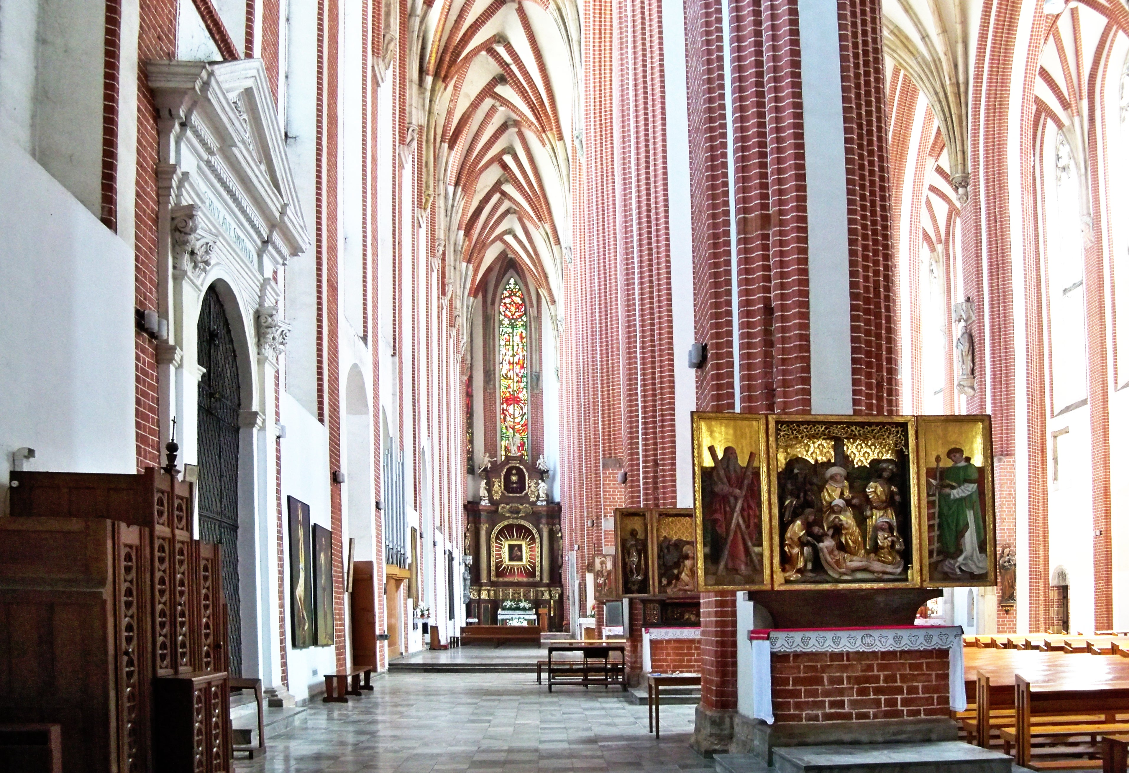 Kościół Najświętszej Marii Panny na Piasku, Wrocław